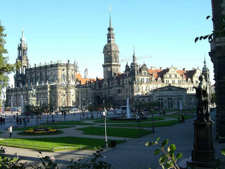 Dresden Altstadt - Theaterplatz